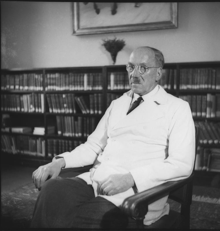 Ferdinand Sauerbruch Prof. Dr. Sauerbruch, Ferdinand [Originaltext unvollständig] Aufn. Illus-Heinscher, 46 [Prof. Dr. Ferdinand Sauerbruch in seinem Arbeitszimmer sitzend (Porträt)] Abgebildete Personen: Sauerbruch, Ferdinand Prof. Dr.: Chirurg, Lungenspezialist, Deutschland (GND 118605798)